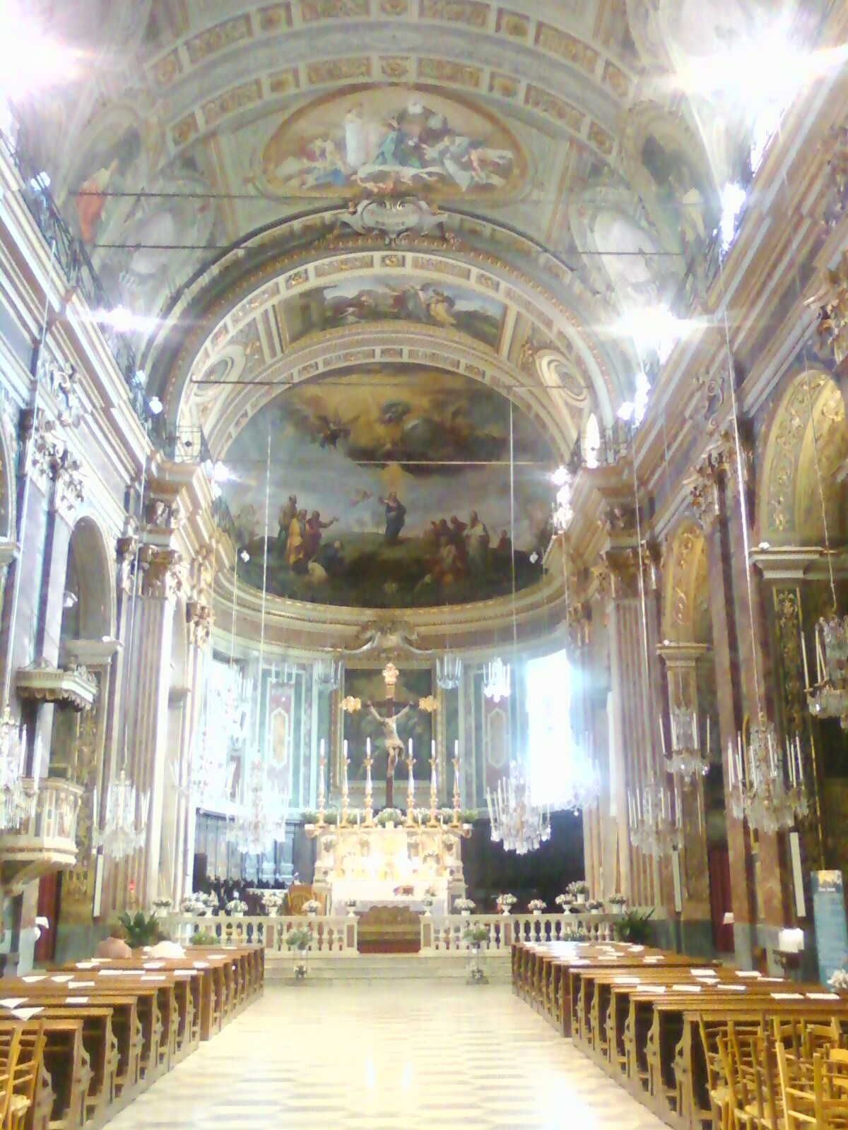 Interno della chiesa della SS Trinità in Sassello (Italy)